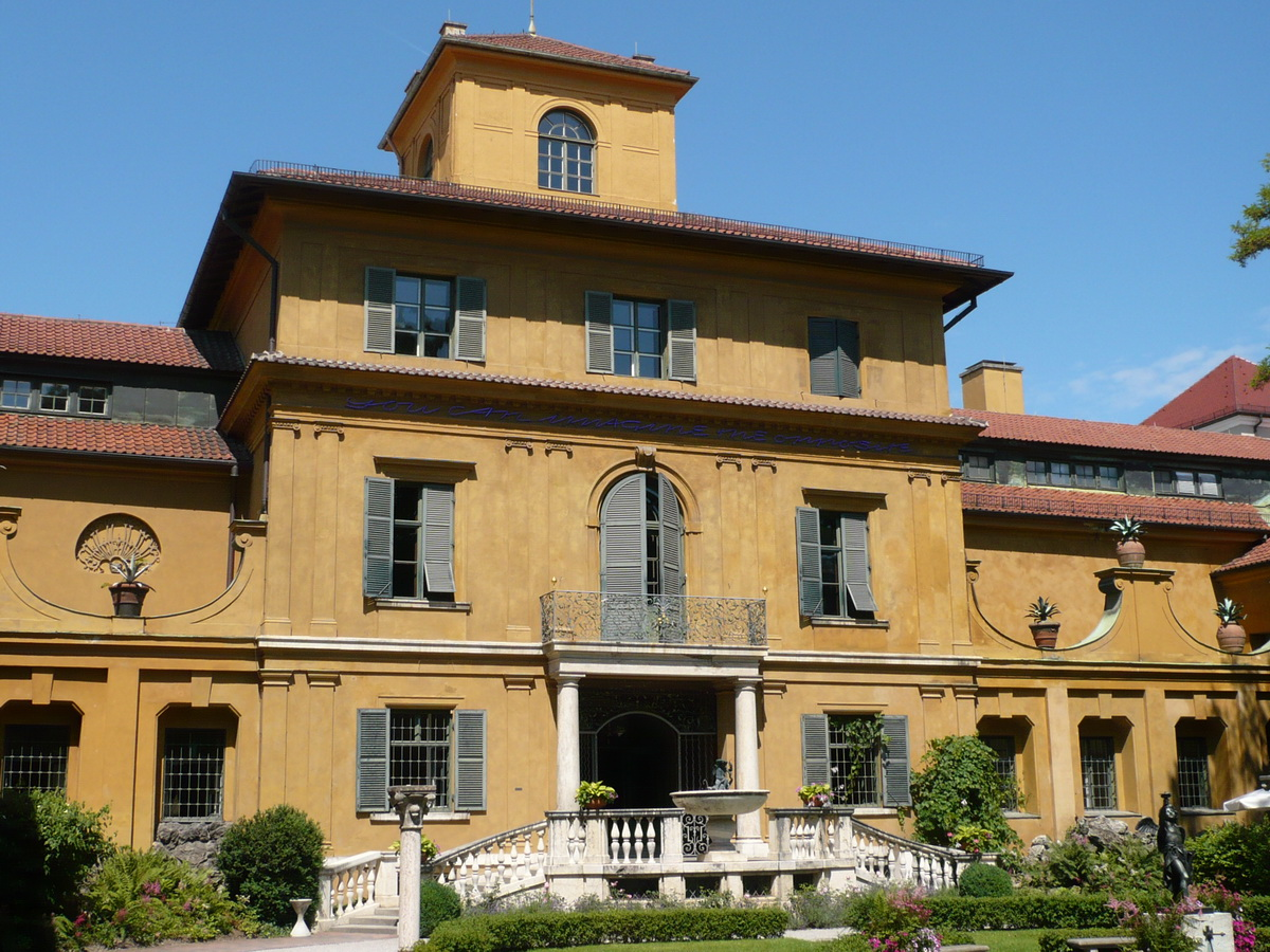 Lenbachhaus in München - Eingang